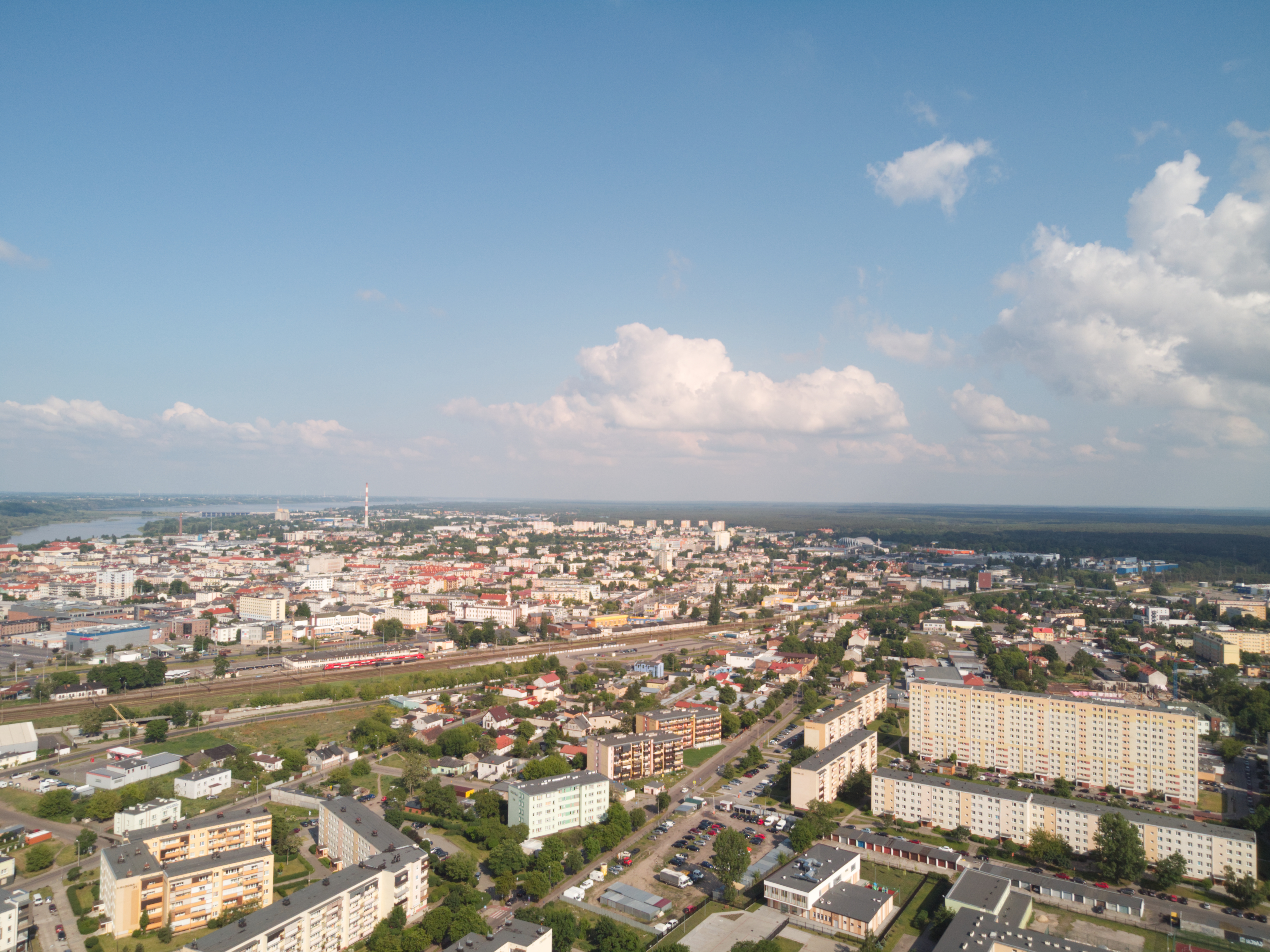 Styk Śródmieścia i Południa (2020 r.)